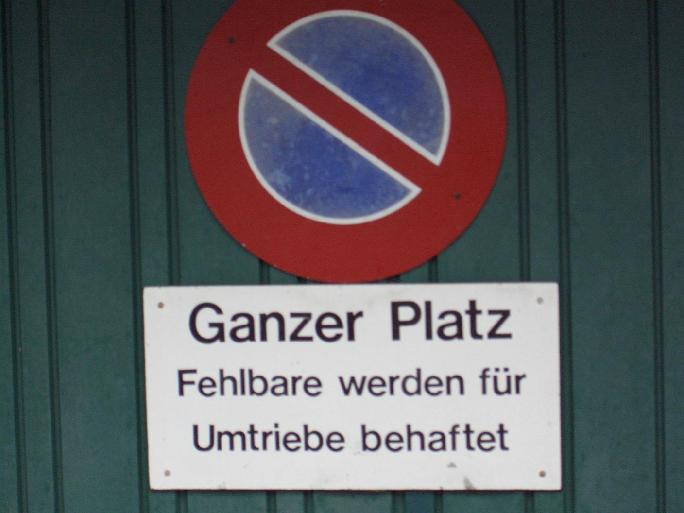 Parkverbotsschild in Basel